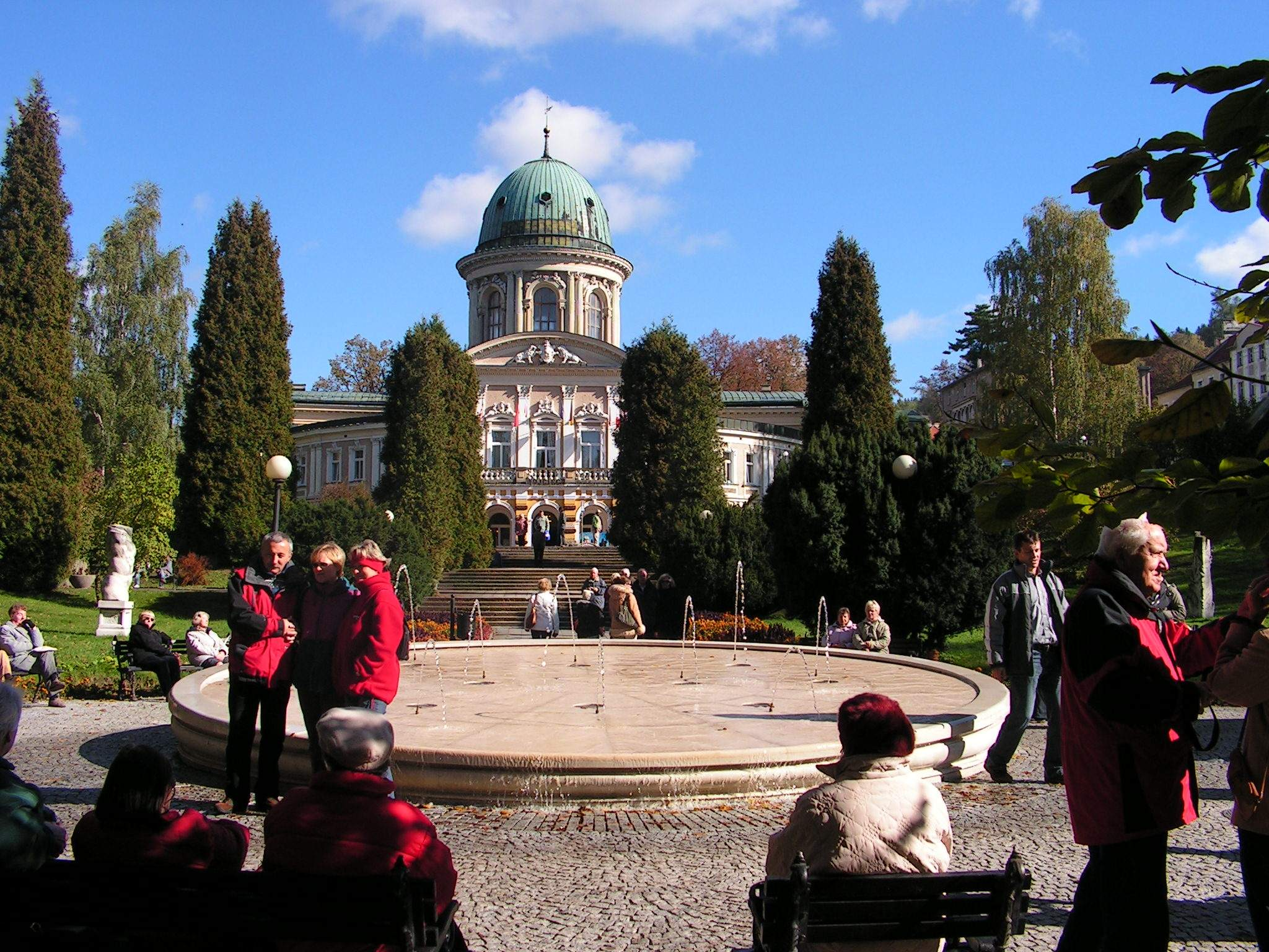 Lądek Zdrój